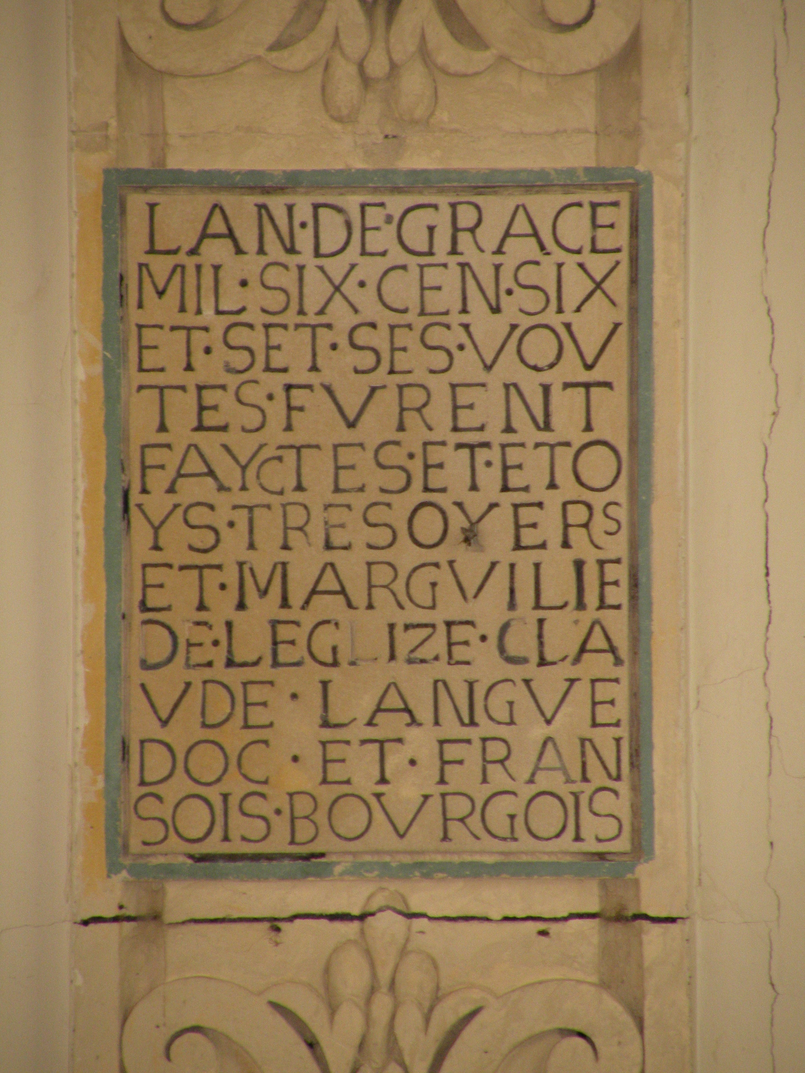 voutes de l'Église Saint-Pierre et Saint-Paul de Jouy-sous-Thelle